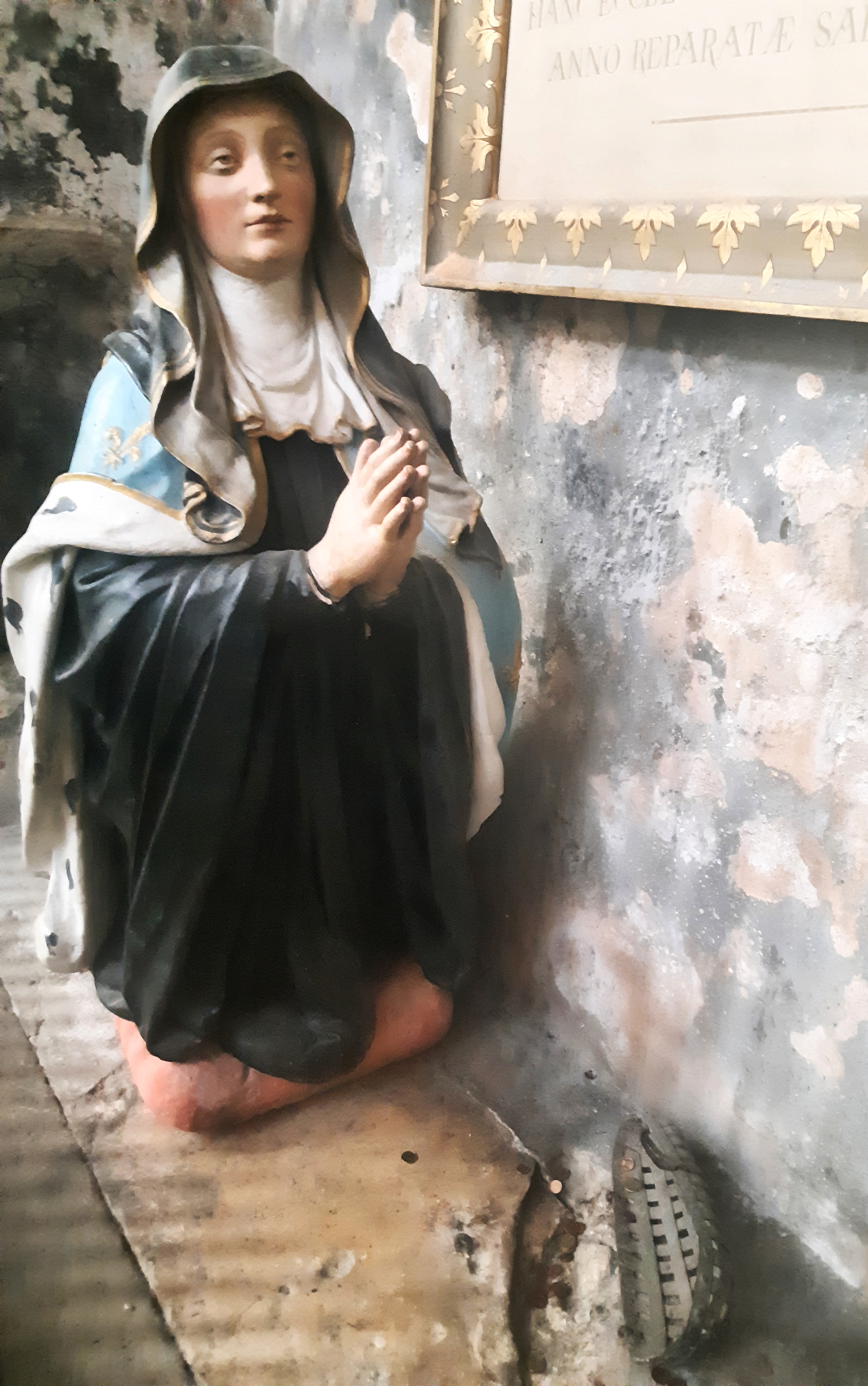 Statue de Sainte Radegonde dans l'église du même nom à Poitiers, priant devant le "pas de Dieu" imprimé dans la roche